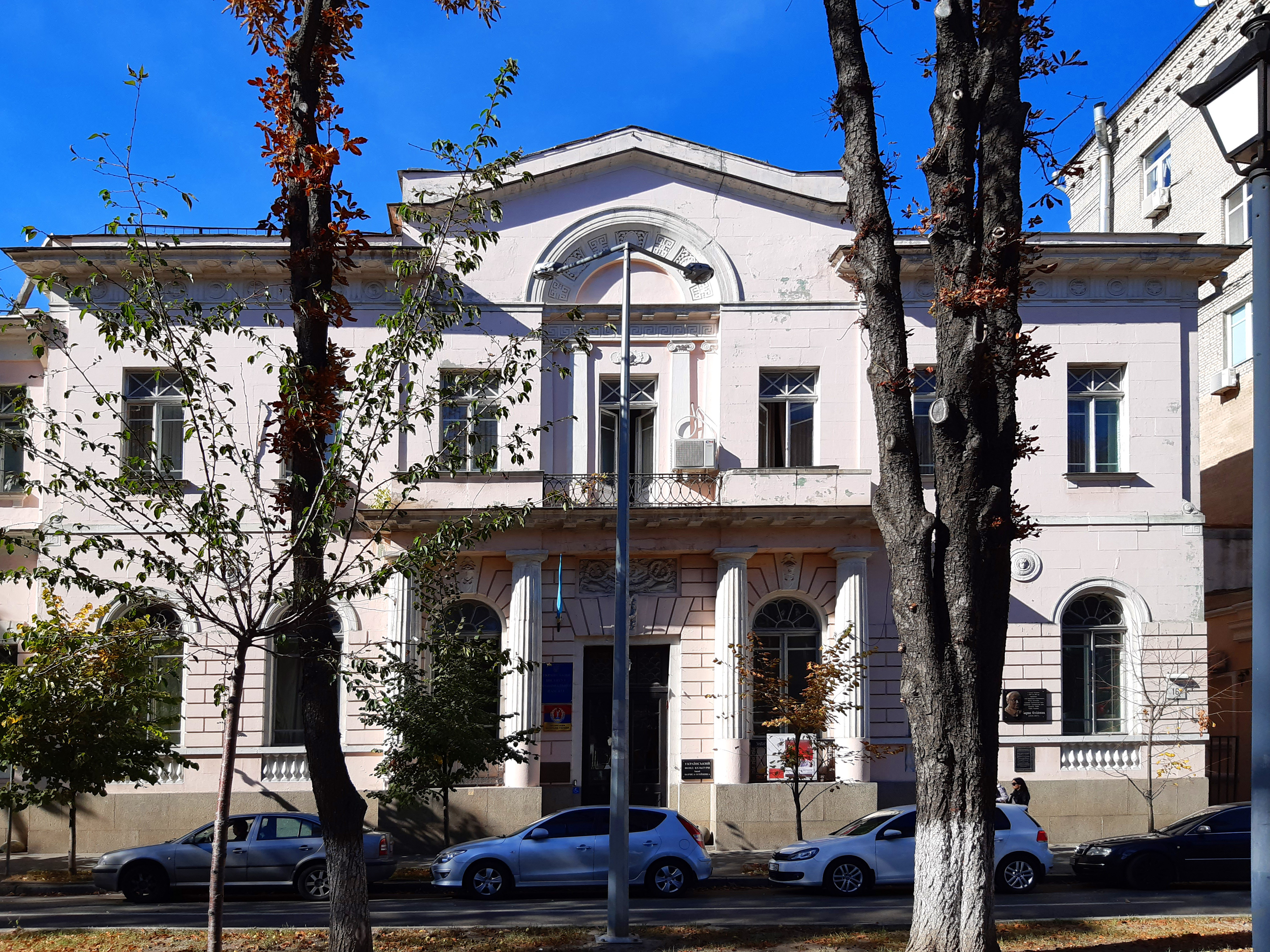 Садиба на Липський, Київ, Липська вул., 16